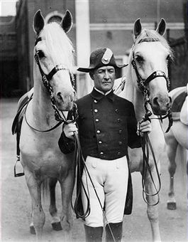 Ernst Lindenbauer mit zwei Lipizzanerhengsten auf einer Gastspielreise der Spanischen Hofreitschule in London